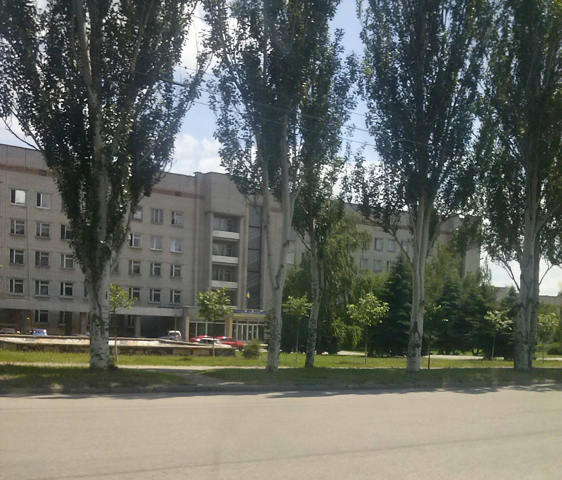 Запоріжжя, вул. Чумаченка, 21-а